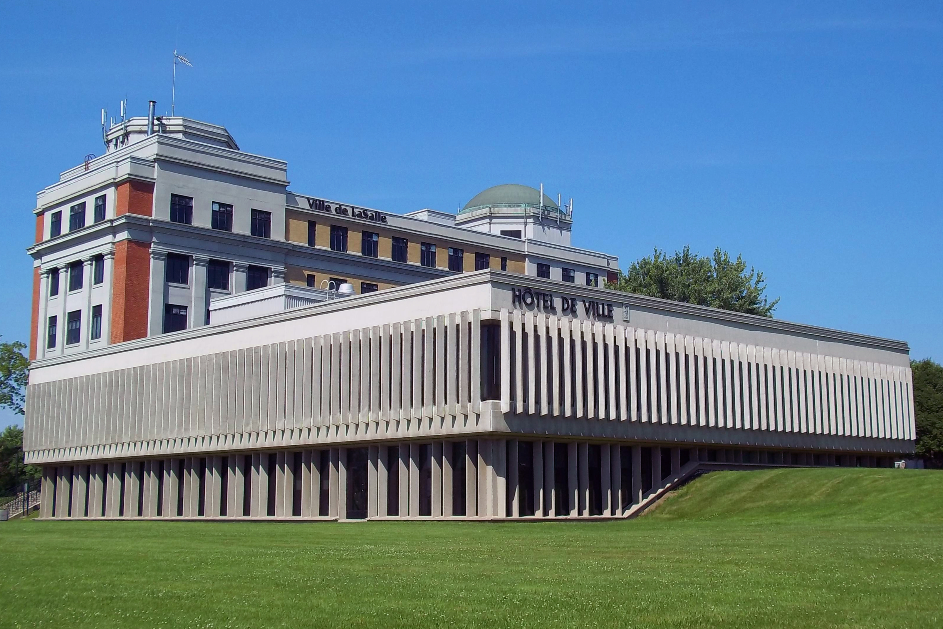 Hôtel de Ville de LaSalle, Montréal, Québec